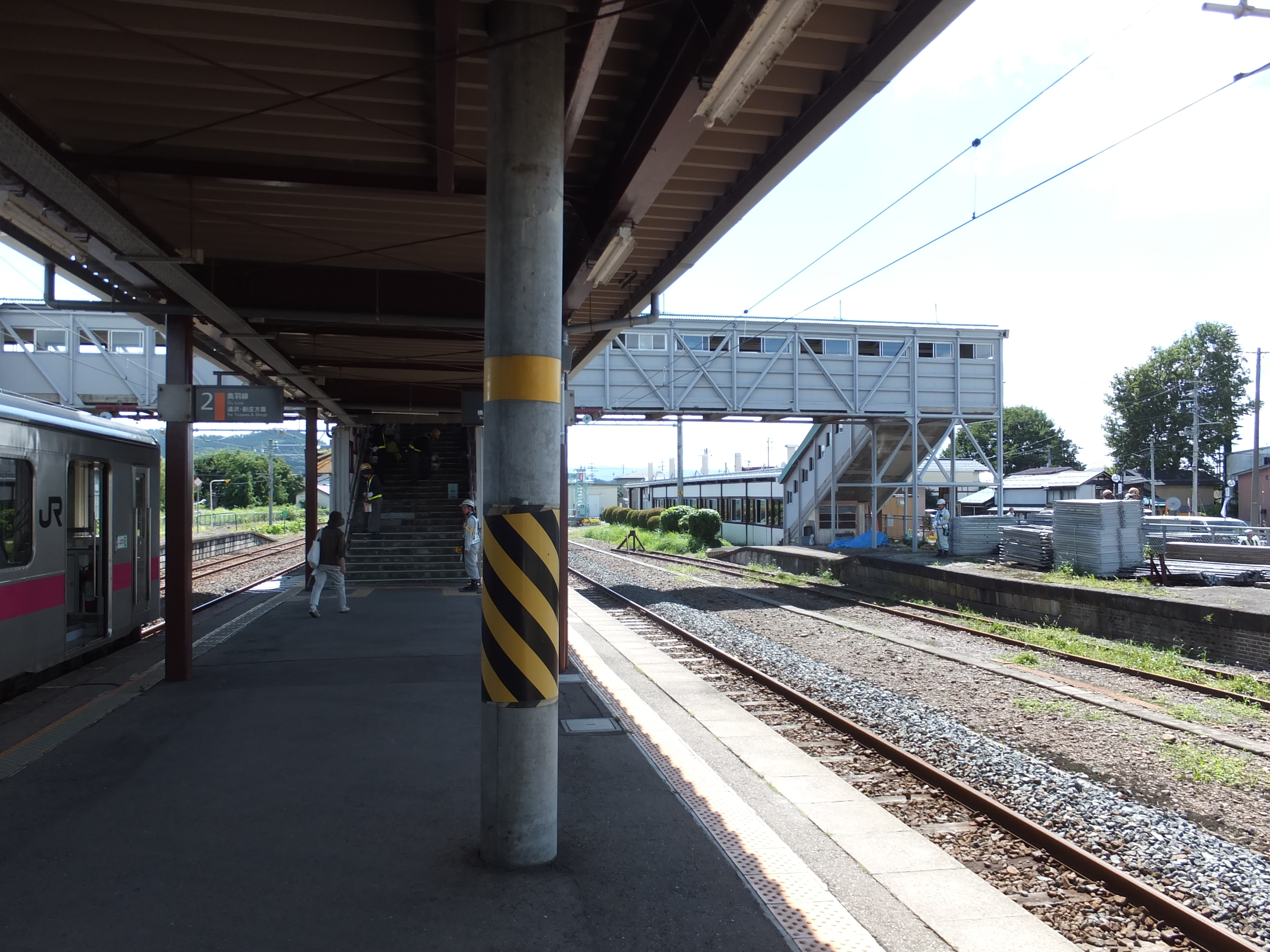 奥羽本線十文字駅プラットホーム